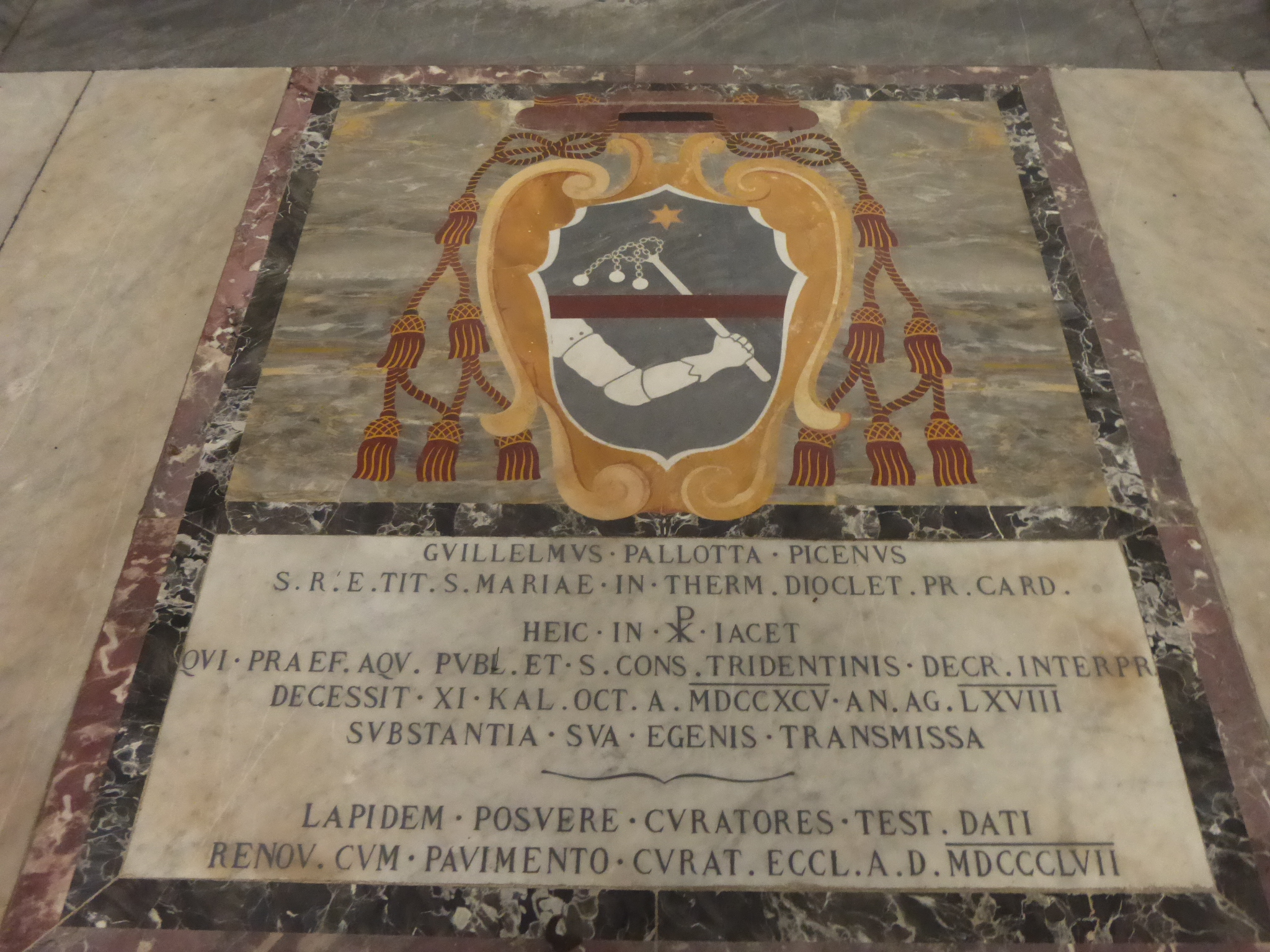 Roma, S. Maria in Portico, sepolcro del card. Guglielmo Pallotta, con stemma e curriculum